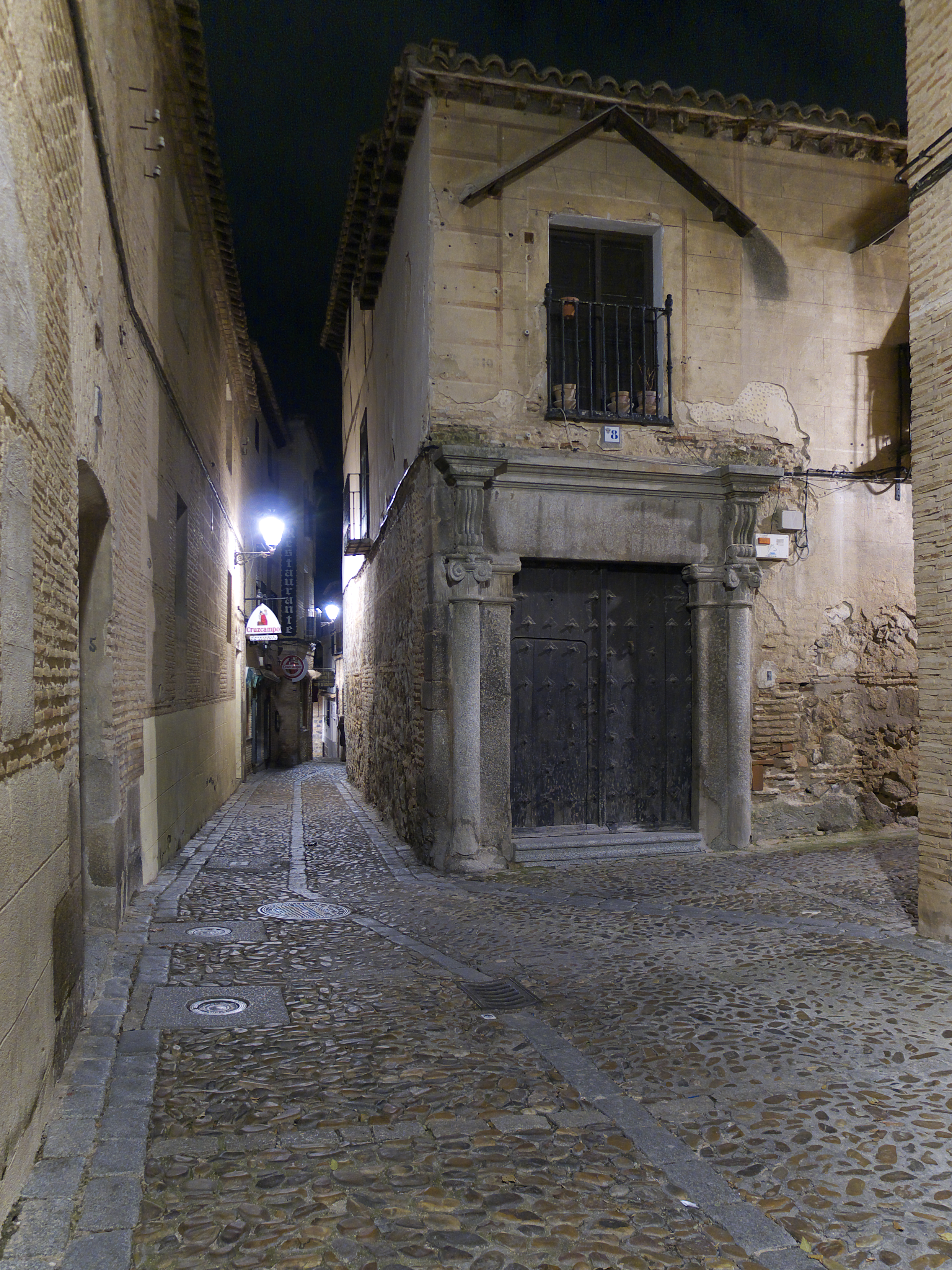 Espacios urbanos de la judería